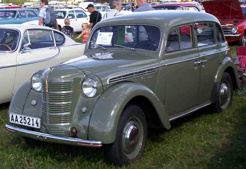 Moskvitch 4-Door Sedan